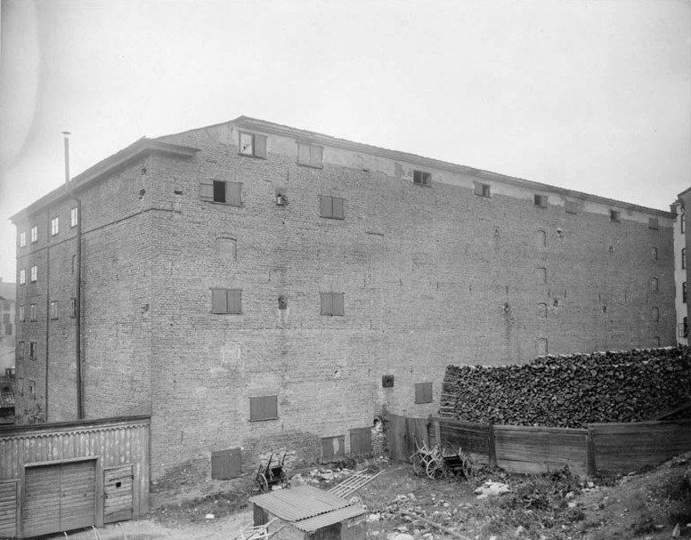 F.d. Brandelska sockerbruket. Fasad mot norr (nuvarande Östermalmsgatan) Referenser Upphov: Larssons Ateljé. Tid: 12 oktober 1903 Beteckning: Fotonummer POSC 549 ; Fotonummer C 290